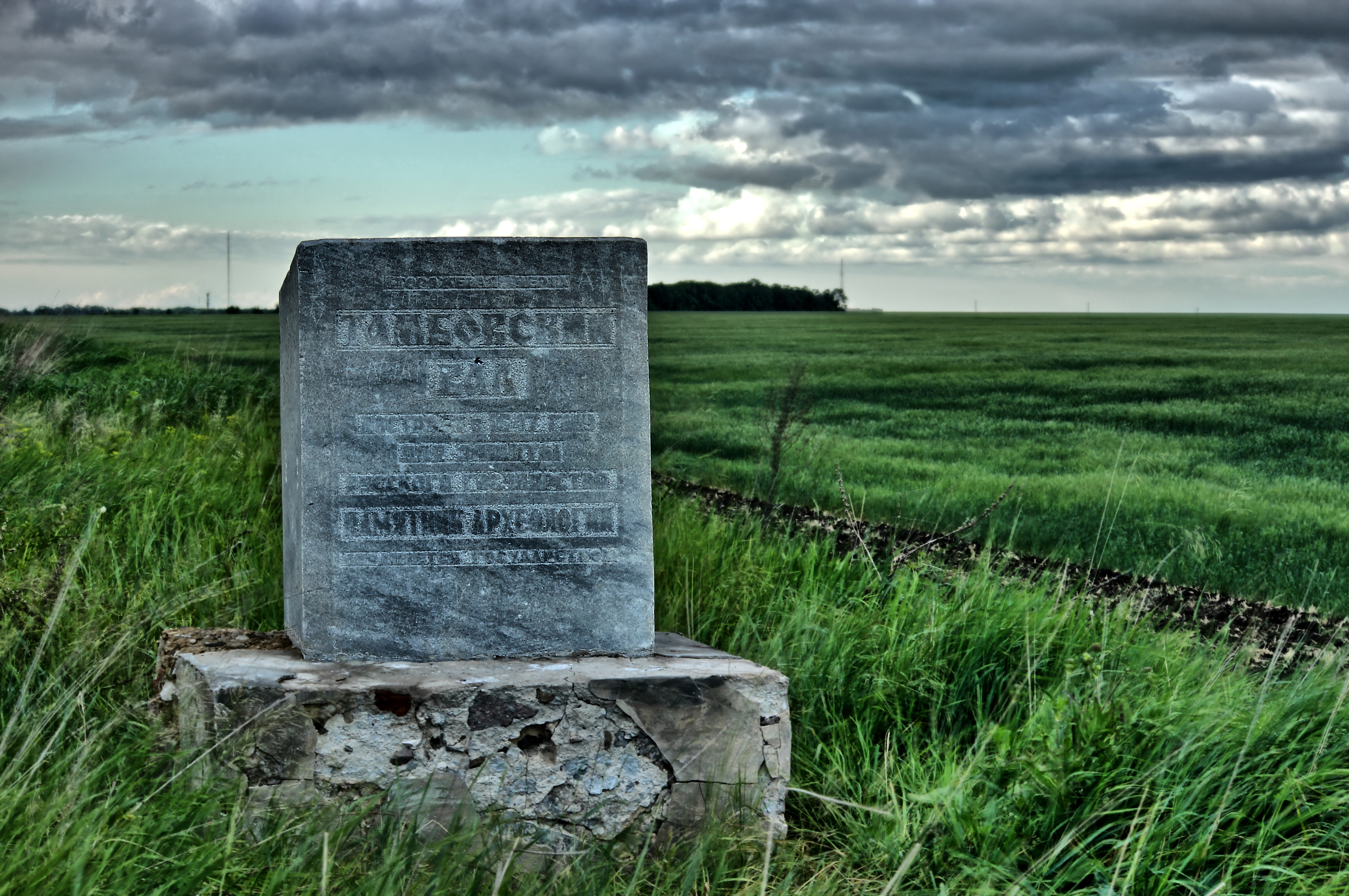 На границе Руси This image is related to the protected area of Russia number 6810091